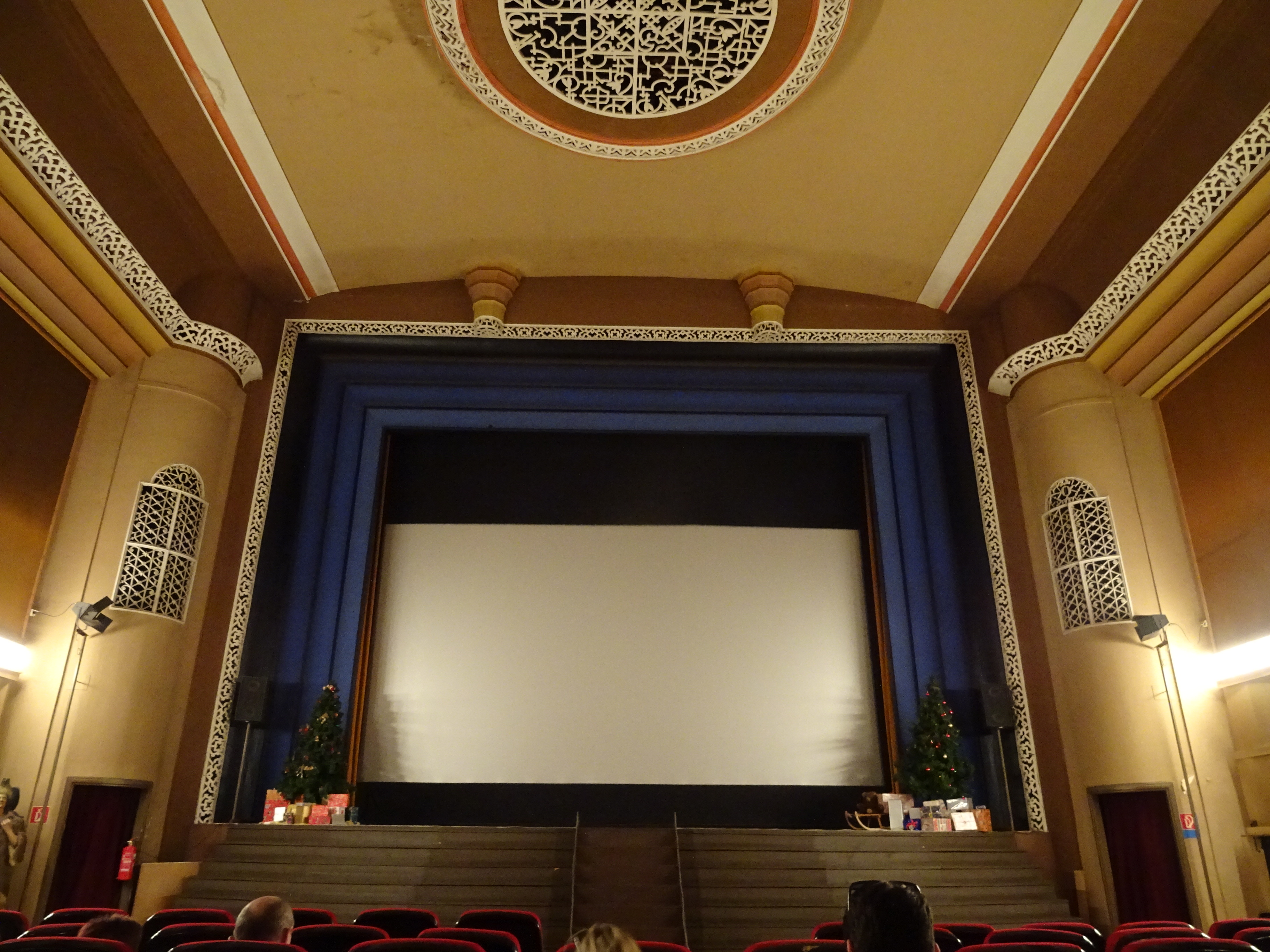 Der große Kinosaal des Capitols in Bernburg.